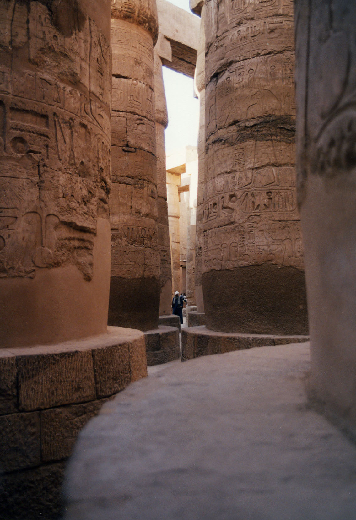 Autore: Hotepibre (Giuseppe); LocalitÃ e data: Karnak, dicembre 2000; Soggetto: la Grande Sala Ipostila di Sethy I e Ramses II nel complesso templare di Amon